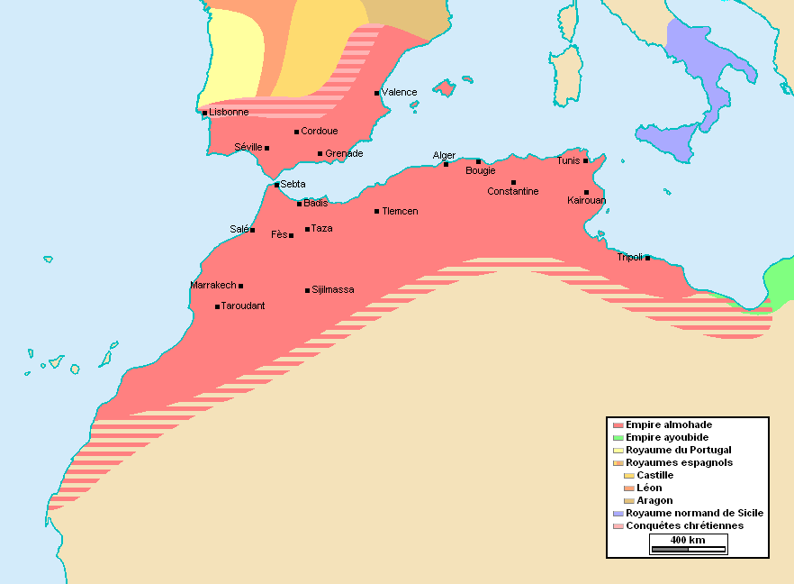 Carte de l'Empire almohade. Selon: [1] [2]